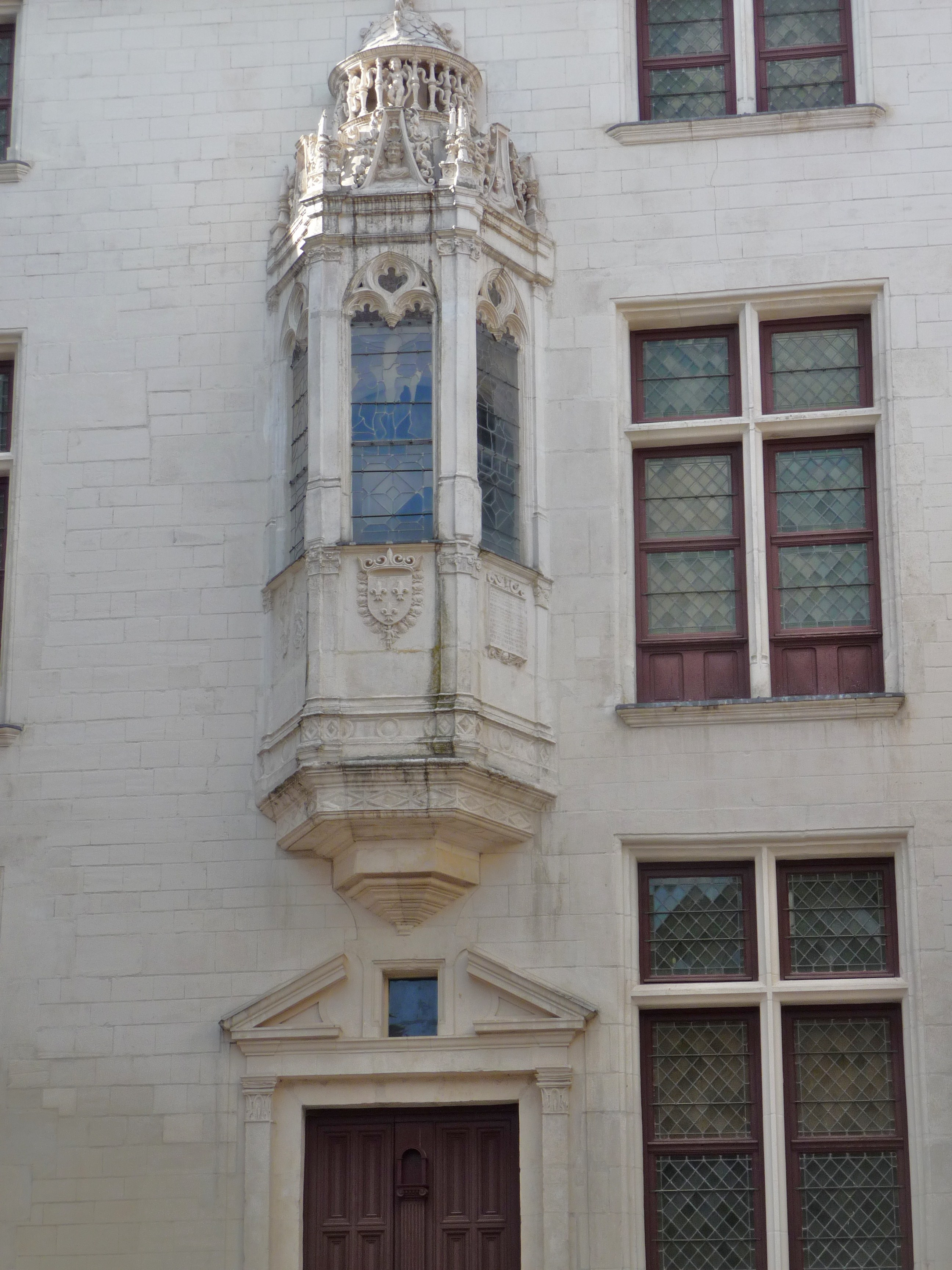 Au dessus de l'entrée, un oratoire aux verrières du XVIe siècle. Blason de France, entouré du cordon de St.Michel .